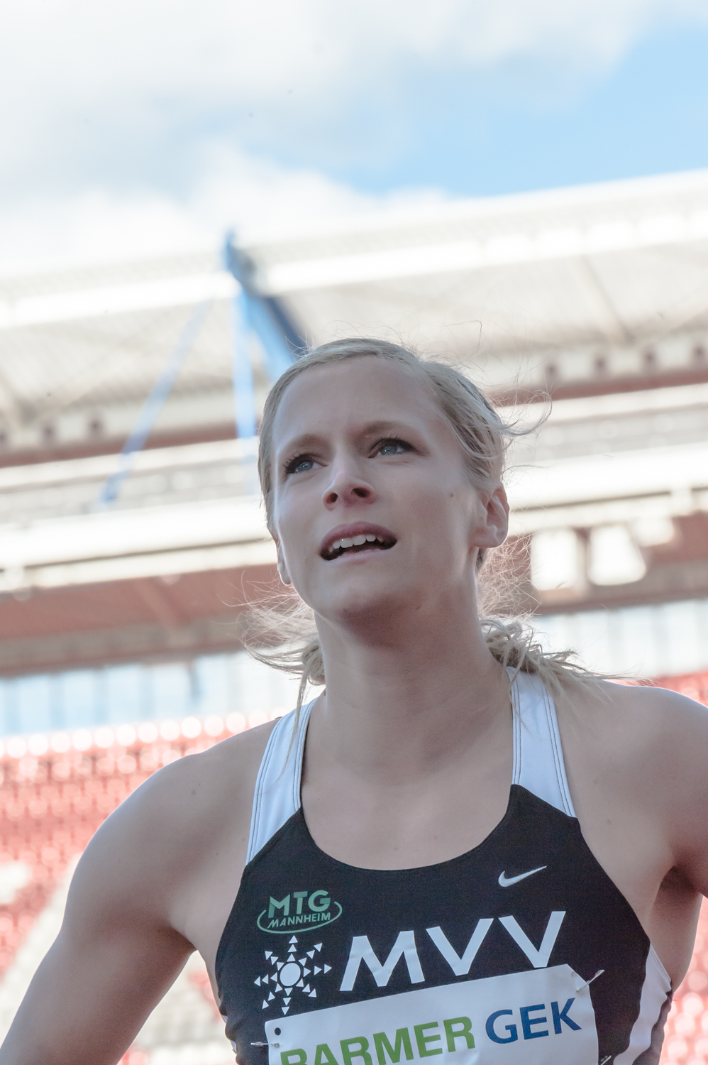 Deutsche Leichtathletik-Meisterschaften 2015: Frauen 100m - Verena Sailer, MTG Mannheim